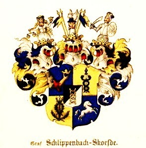 Wappen derer von Schlippenbach (Grafen Schlippenbach-Skoefde)